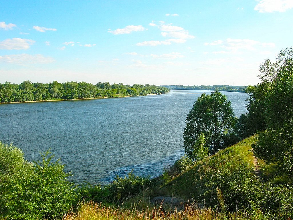 Grodzisko Wyszogród w Bydgoszczy - letnia panorama na Wisłę